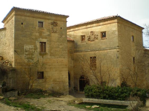 Casas restauradas de los De la Fuente Bustamante en Bustillo en Cortiguera (Burgos, Castilla y León). Las cuales conservan sendos escudos, bajo uno de los cuales figura la fecha de construcción del edificio: 1701.